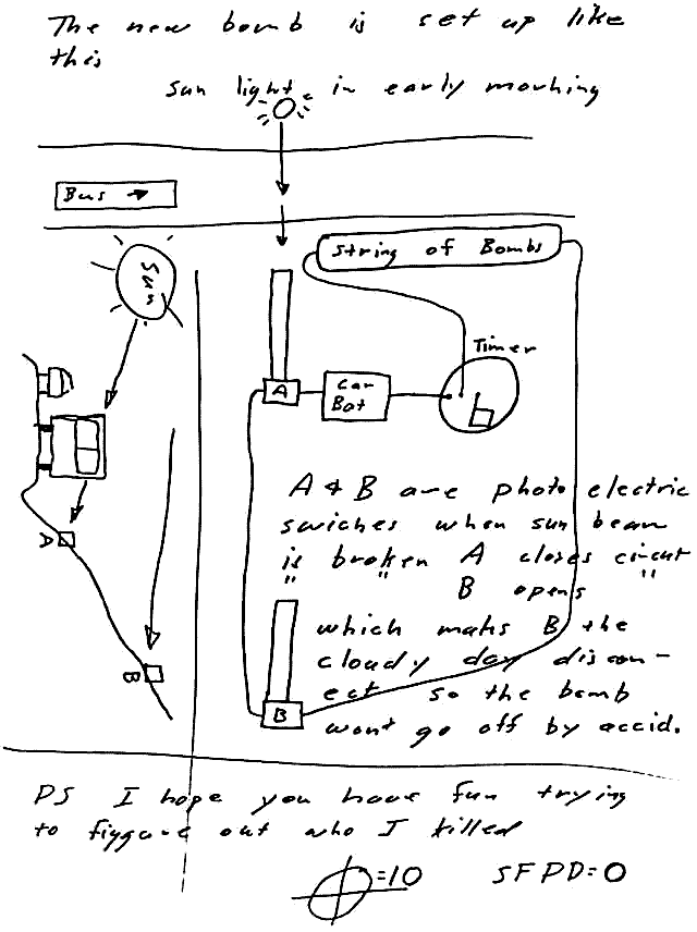 Zodiac-Bomb diagram